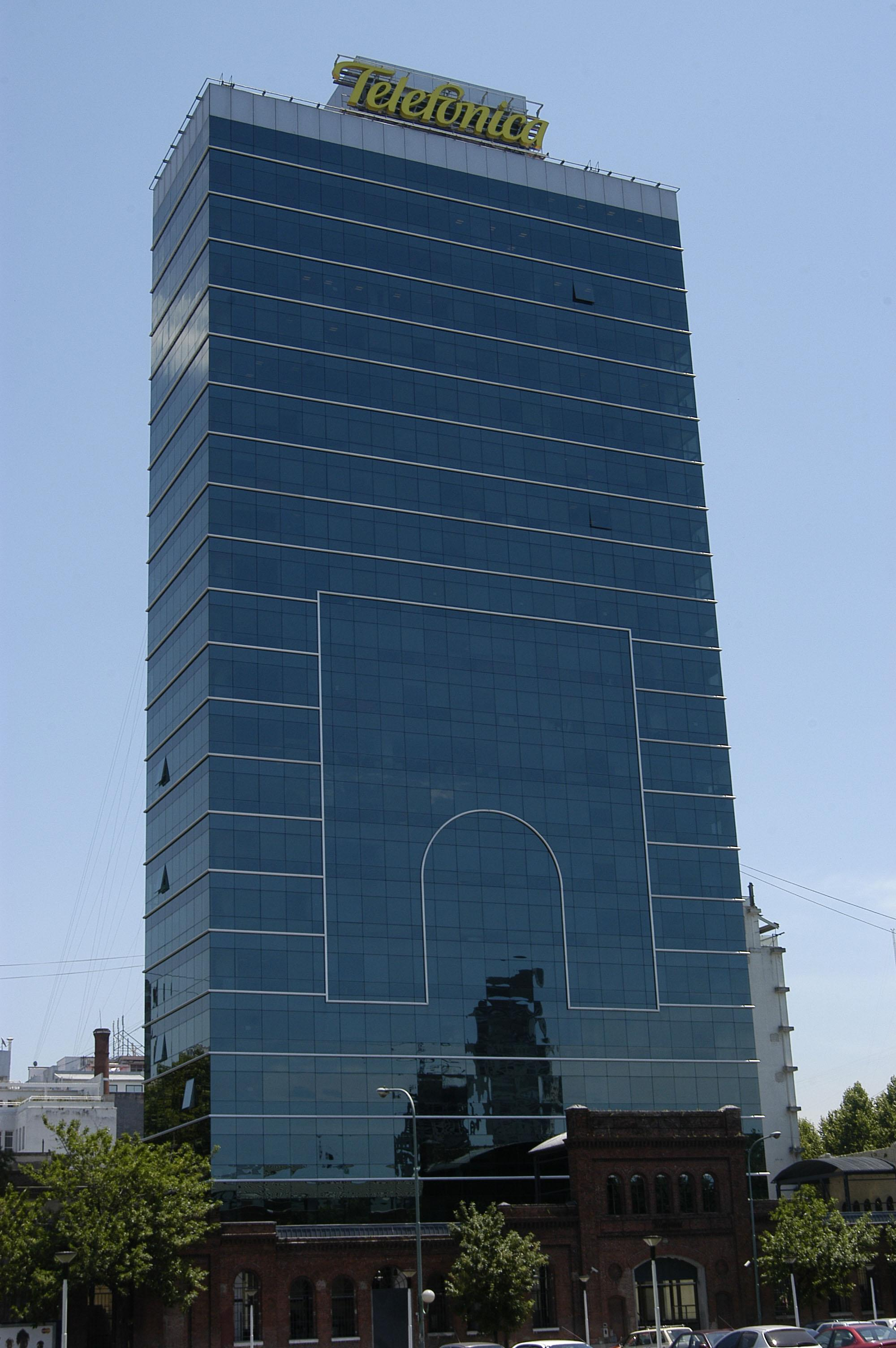 Torre SK (2002), Sede Central de Telefónica de Argentina, en el barrio de San Telmo. Buenos Aires, Argentina. [1]